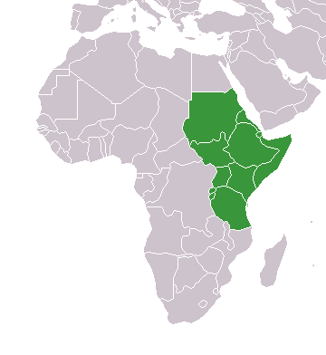 Karte Mitgliedstaaten des Council for East and Central Africa Football Association